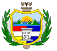 Escudo de Guatemala de 1851 a 1858.